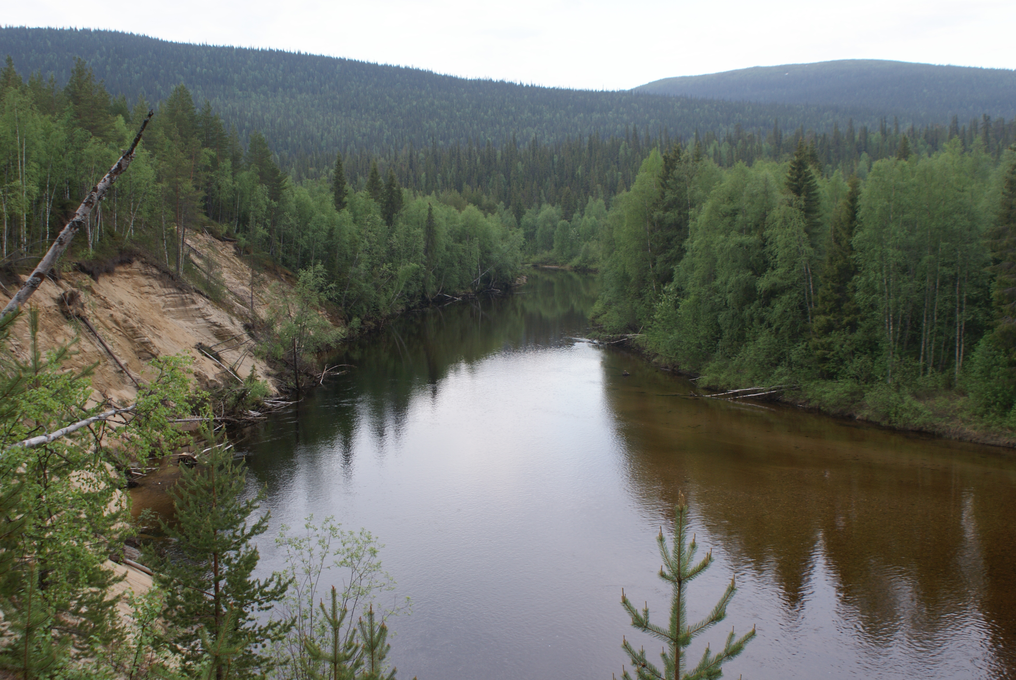 Заказник «Кайта»: Гора Кайта и прилегающие к ней возвышенности (в том числе горы Келесуайв, Крутая, Мохнатые Рога, Седловатая, Гремяха, Водяная), территории в верховьях рек Ена, Ватсиманйоки, Каменкаэ,Ковдорский район, Мурманская область This image is related to the protected area of Russia number 5110048